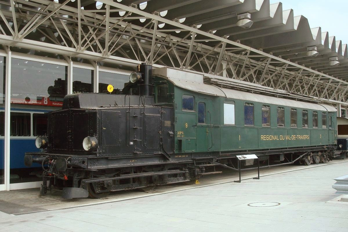 Dieselelektrischer Triebwagen ABm 2/5 9 (ex. BCm 2/5 9) des Régional du Val-de-Travers (RVT) mit Baujahr 1914, ausgestellt im Verkehrshaus der Schweiz in Luzern.